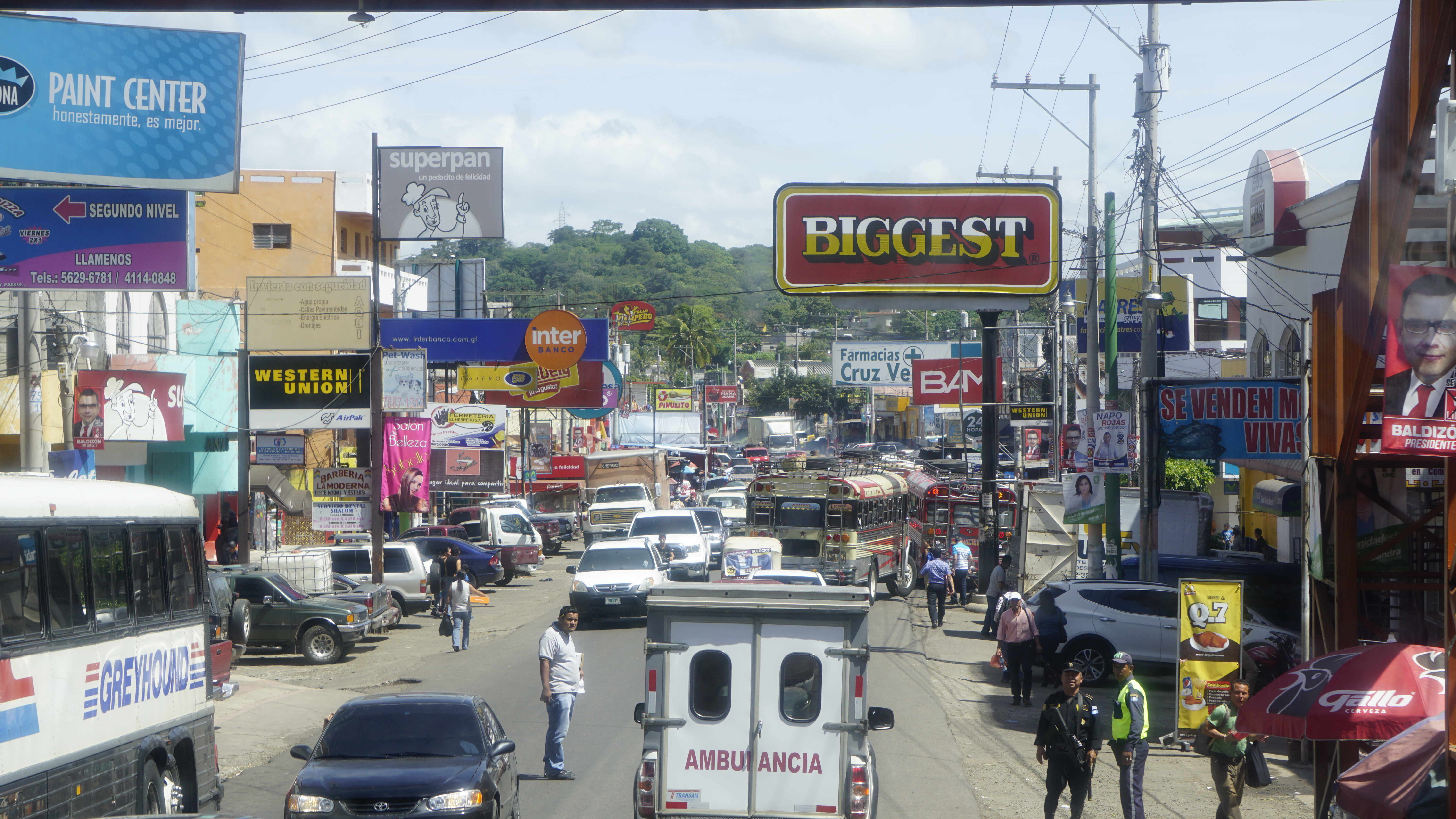 Vista de la Carretera Interamericana hacia el Noroeste desde la intersección de la misma carretera y la 5ª Avenida en Barberena, Departamento de Santa Rosa, Guatemala.